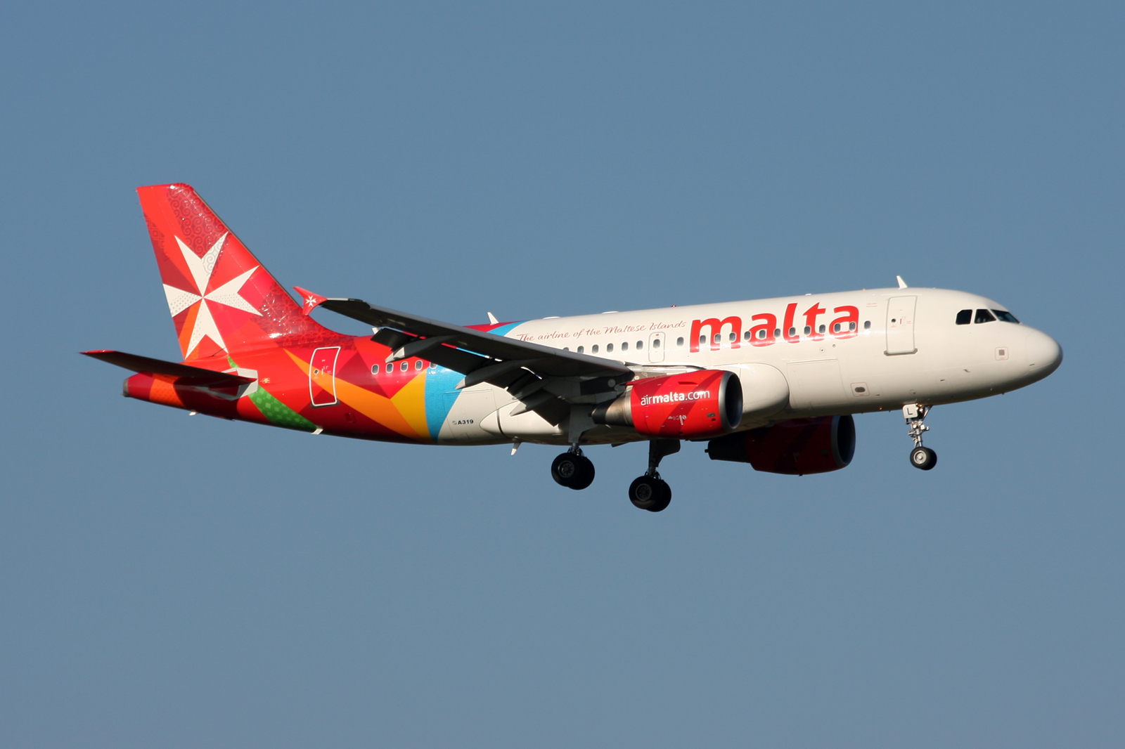 Zürich 3.2016